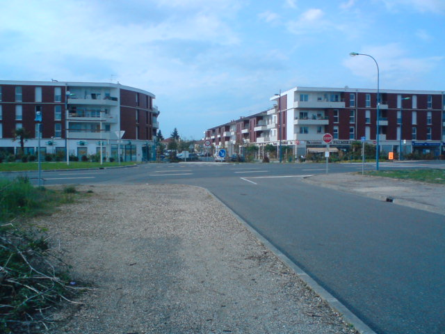 Nouveau quartier commerçant de la ville du Passage d'Agen